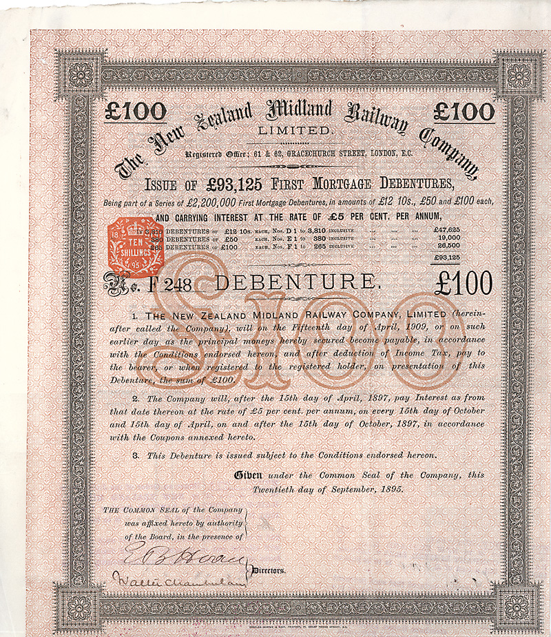 Debenture der New Zealand Midland Railway Co. vom 20. September 1895